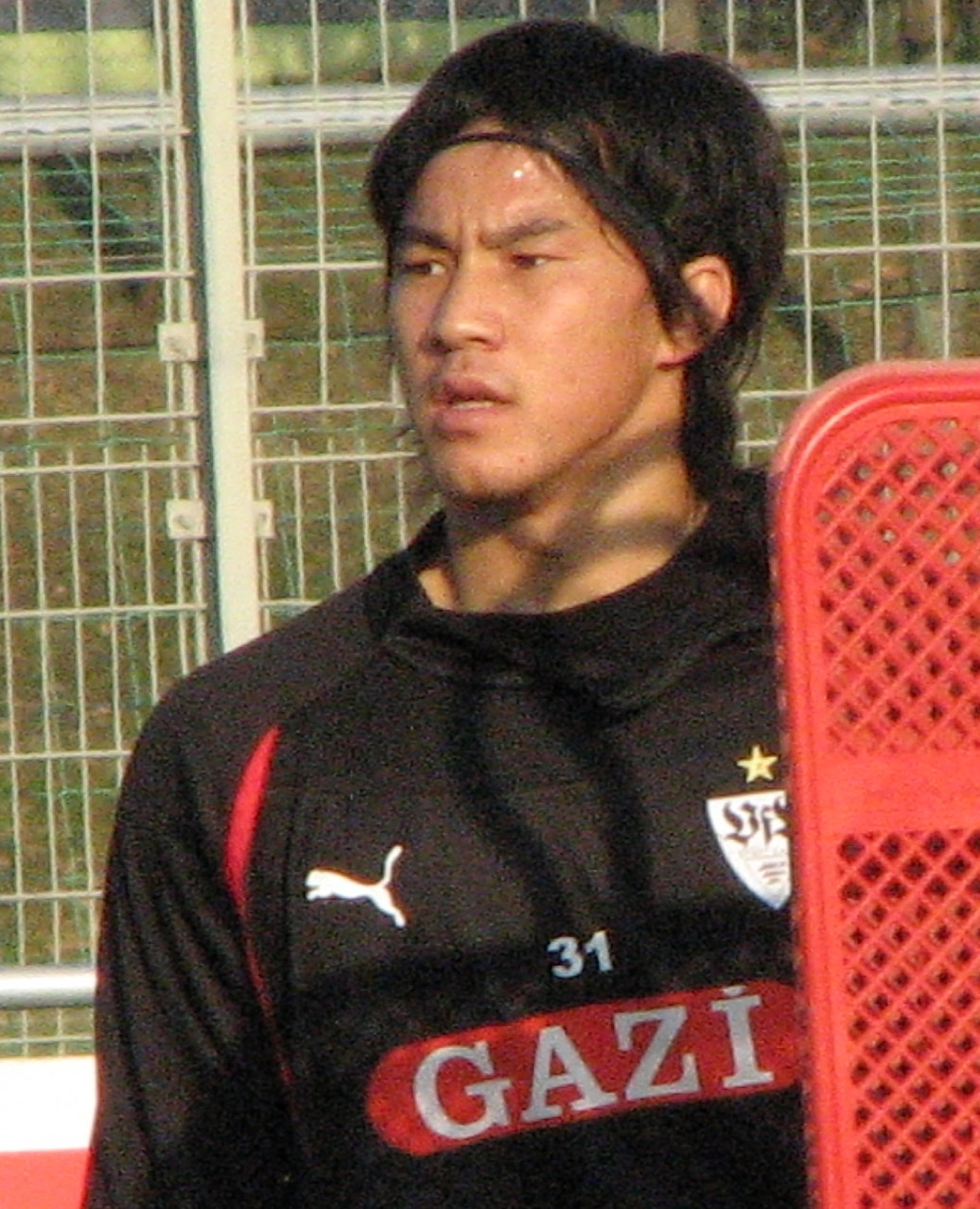 Shinji Okazaki kam in der Winterpause 2011 zum VfB Stuttgart. Aufgenommen von